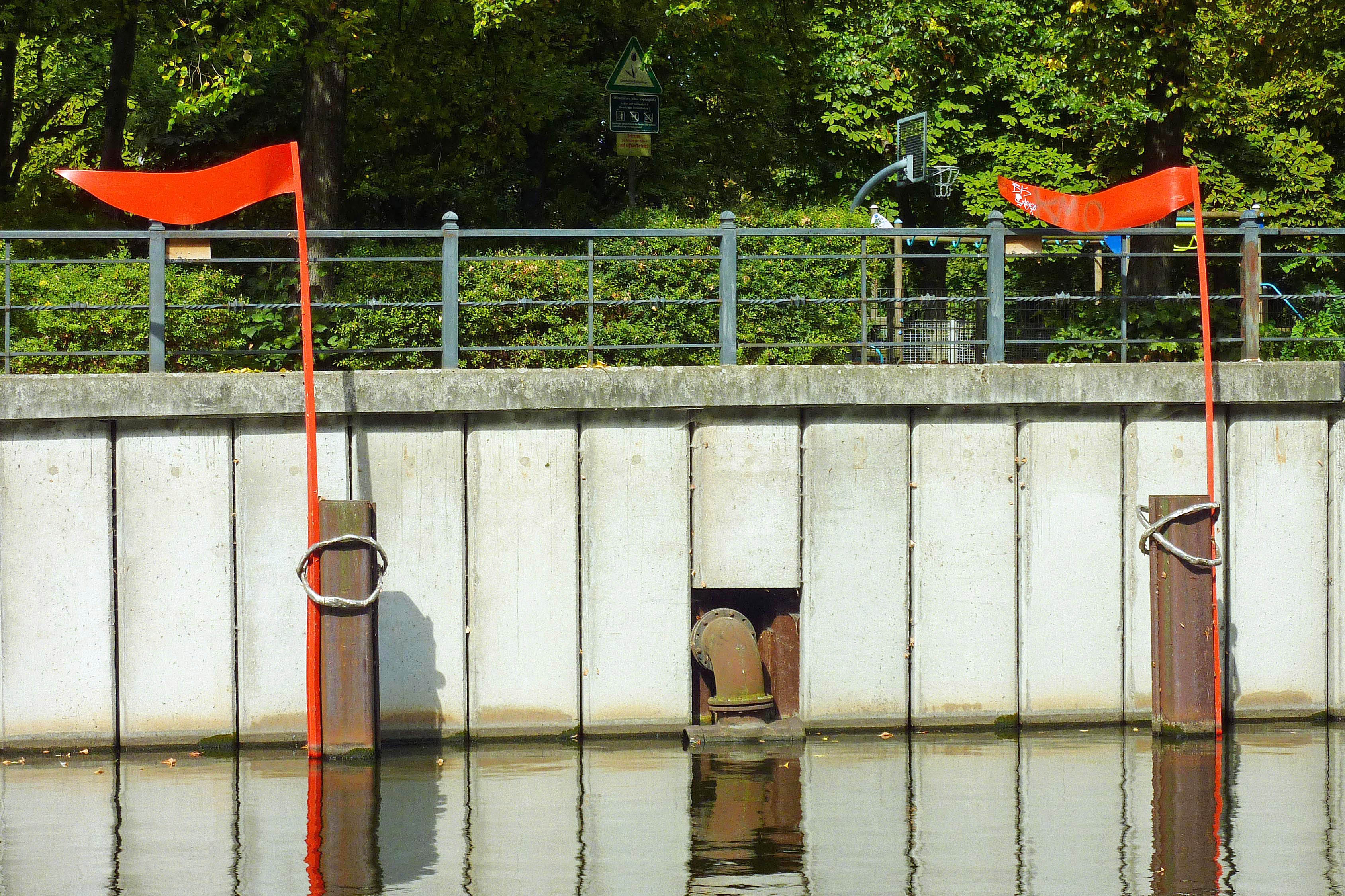 Installation 'Parodia' aus Baustahlträgern und Edelstahl von Eduard Habicher an der Fischerinsel am Spreekanal in Berlin-Mitte, westlich der Neuen Roßstraßenbrücke. Teil Habichers Wassergalerie 'Der Rote Faden am Hafen' entlang des Spreekanals.